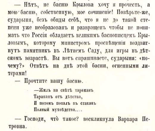 Страница романа Достоевского Бесы, стихи капитана Лебёдкина